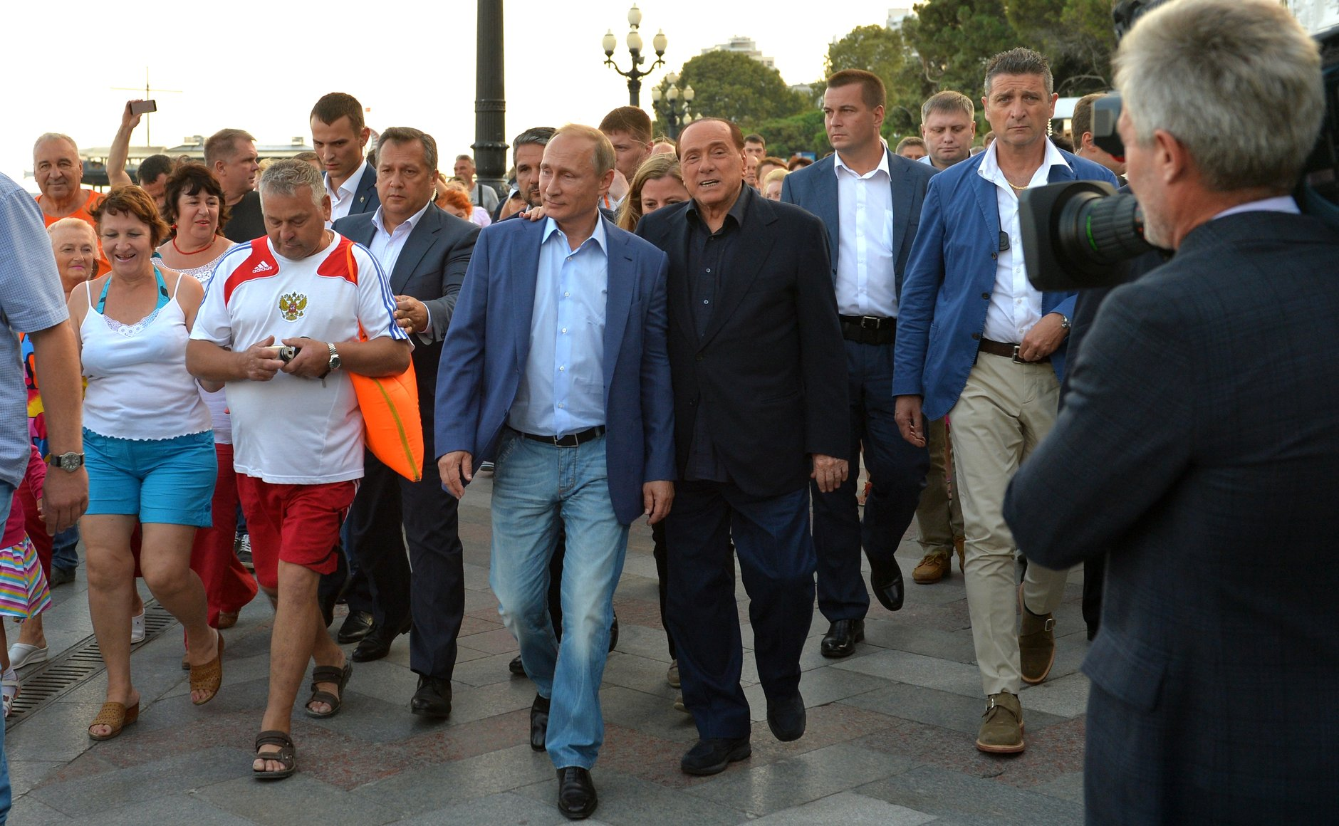 Владимир Путин встретился в Крыму с Сильвио Берлускони, находящимся в России с частным визитом